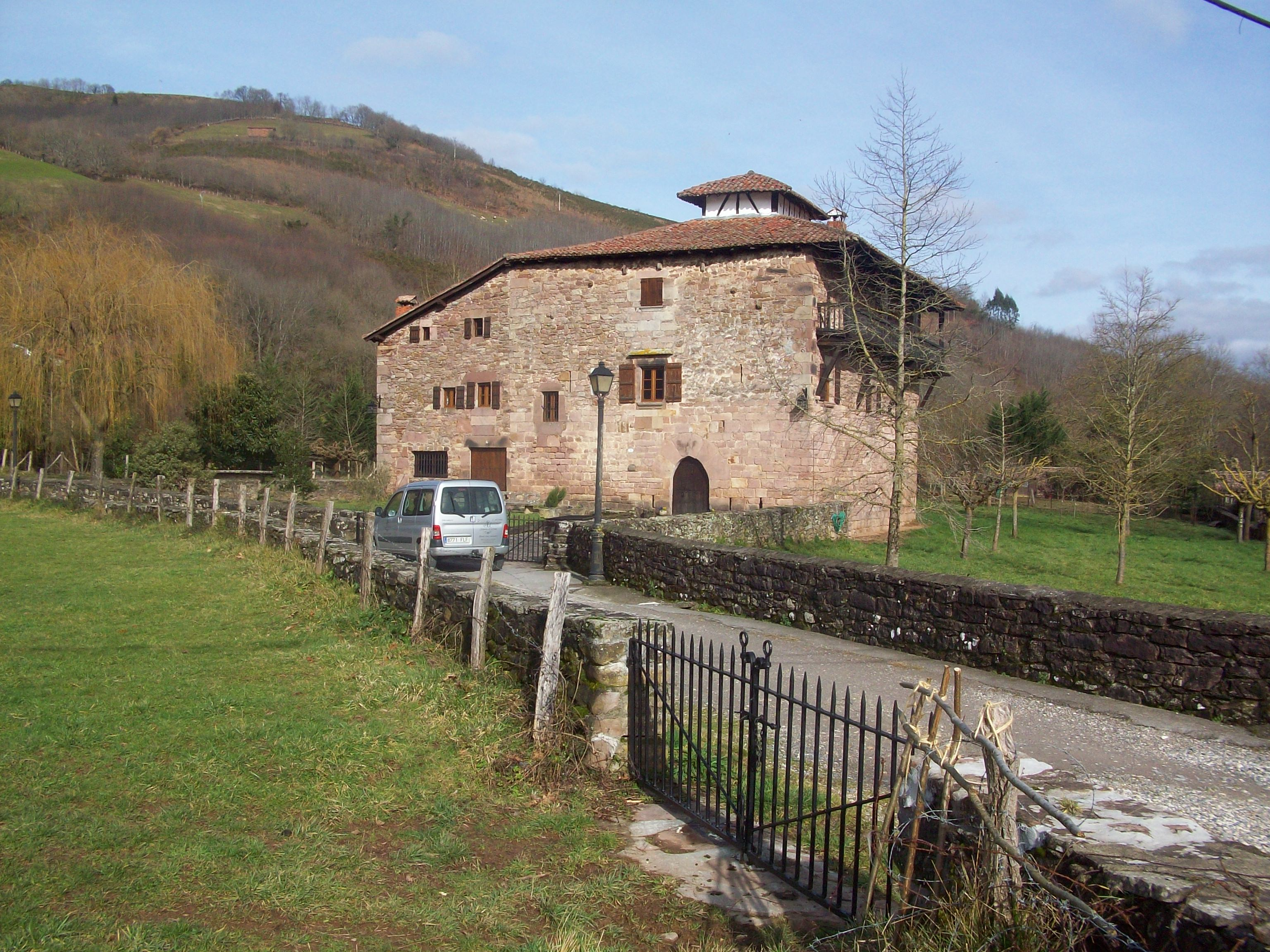 Baztango Arraioz herriko Zubiria jauregia. Nafarroa, Euskal Herria. Zubiria palace in Arraioz, Baztan. Navarre, Basque Country.